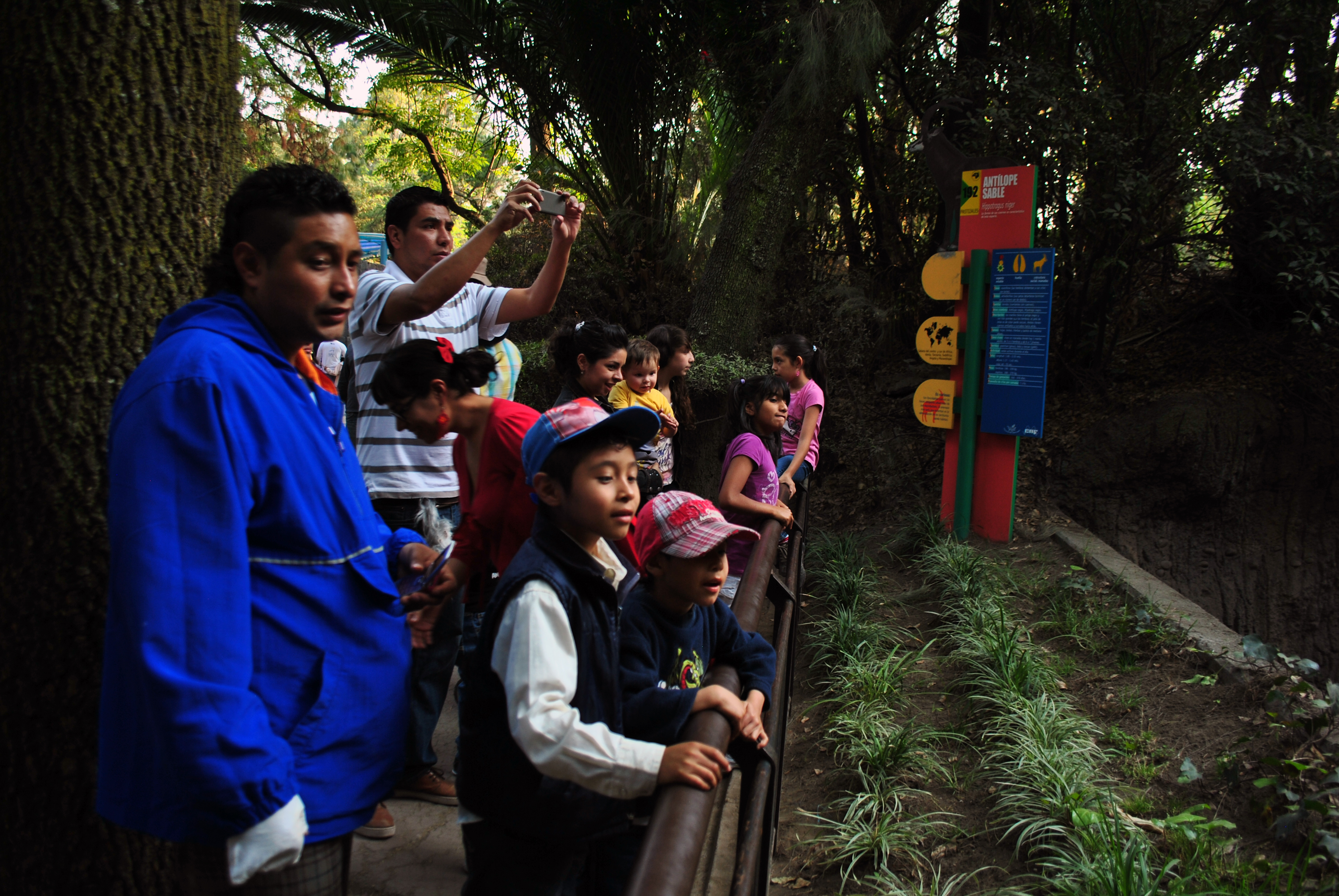 Visitantes del Zoológico de Chapultepec.